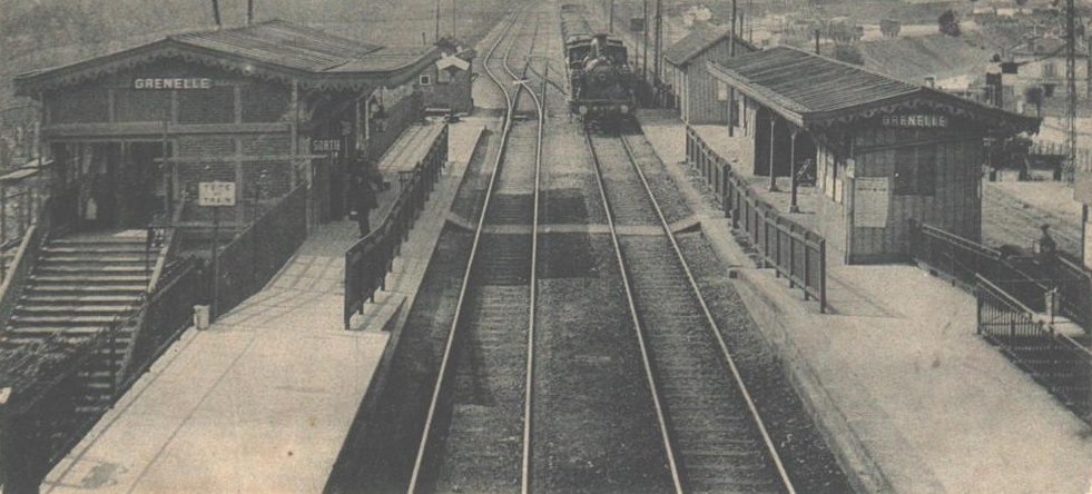 Gare de Grenelle (Paris 15e) - Petite Ceinture